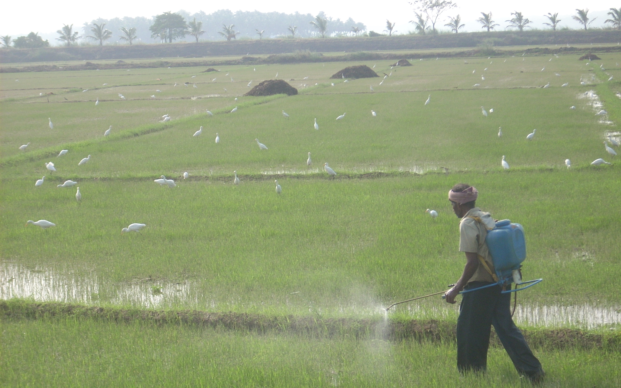 വയല്‍കാഴ്ചകള്‍. അടാട്ട്, ഒമ്പതുമുറി പാടം, തൃശ്ശൂര്‍ This media file is uploaded with Malayalam loves Wikimedia event - 2.